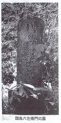 歴史伝承フォーラム代表 田中豊 「伊予国大洲藩 いろは丸事件 国島六左衛門と坂本龍馬」岐阜県岐阜市